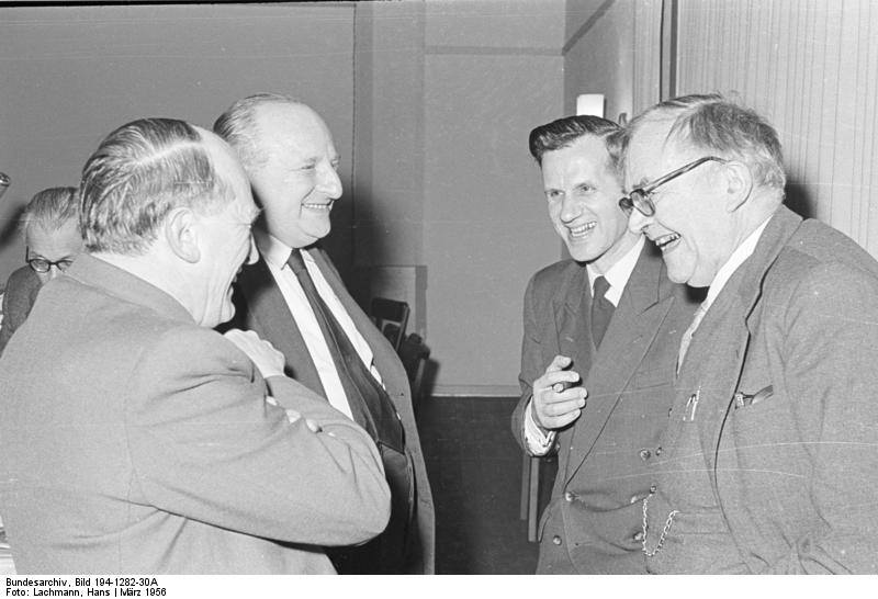 Ev. Gesellschaft Jahrestagung Wuppertal 1956 mit Karl Barth